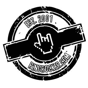 Logo der WarmUp-Organisation